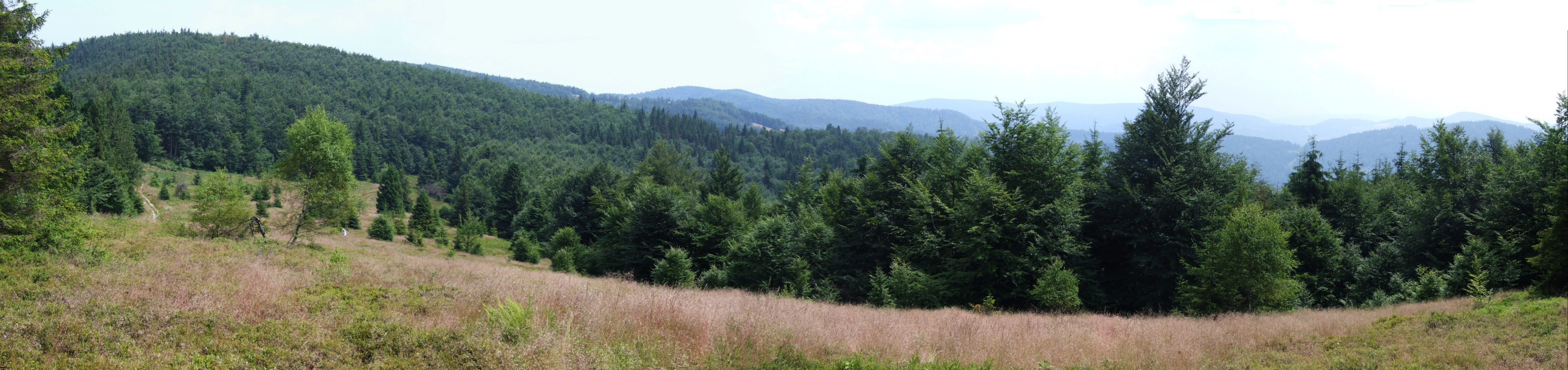 Hala Pisana w Beskidzie Sądeckim i panorama widokowa